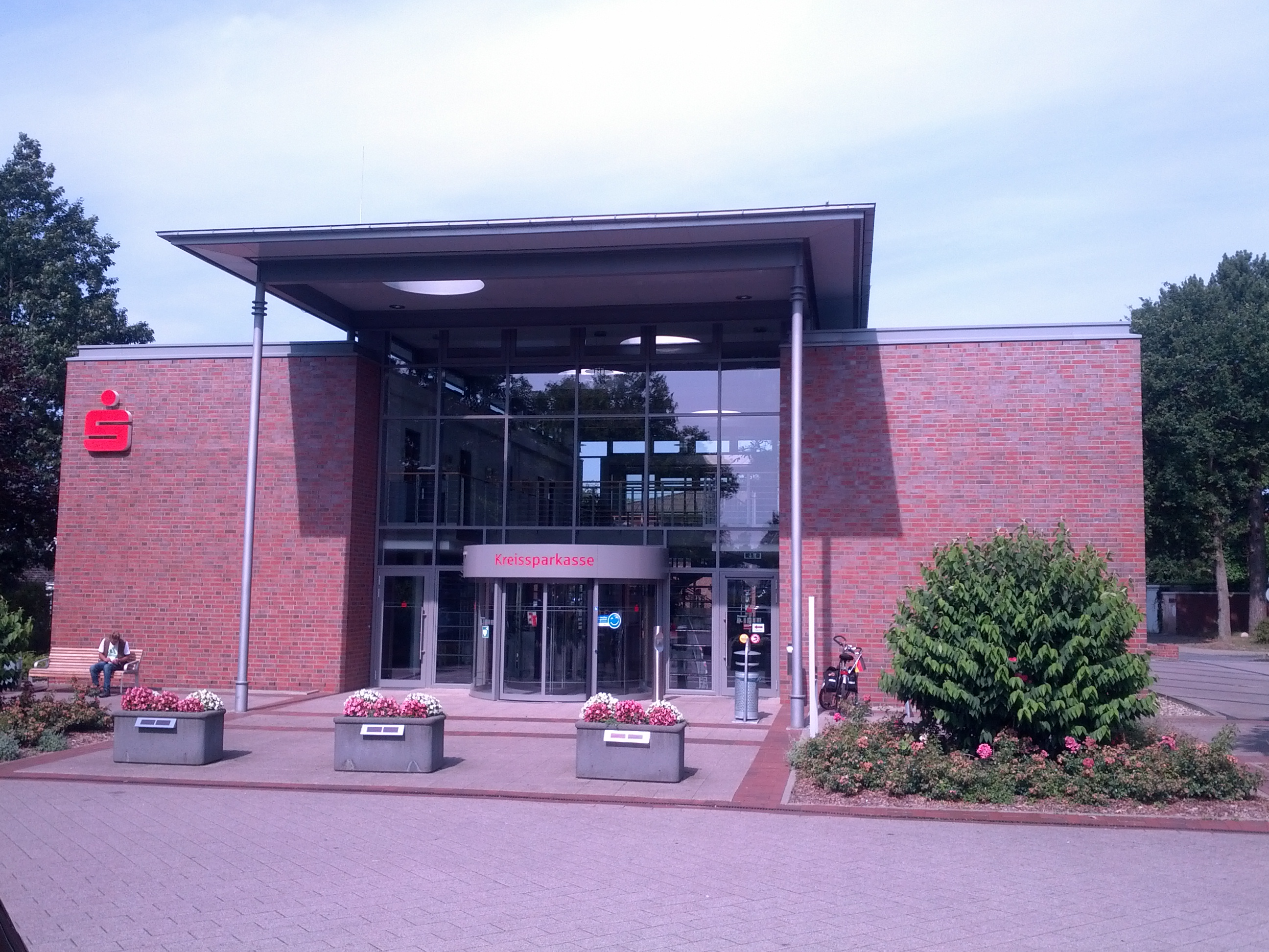 Front von de Spoorkass in Hemmoor 2014